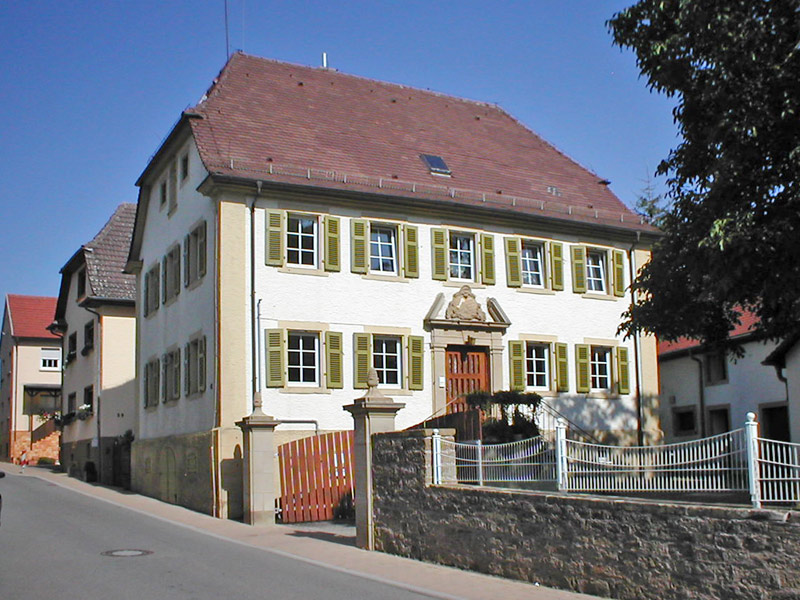 Historisches Pfarrhaus in Bad Rappenau-Grombach